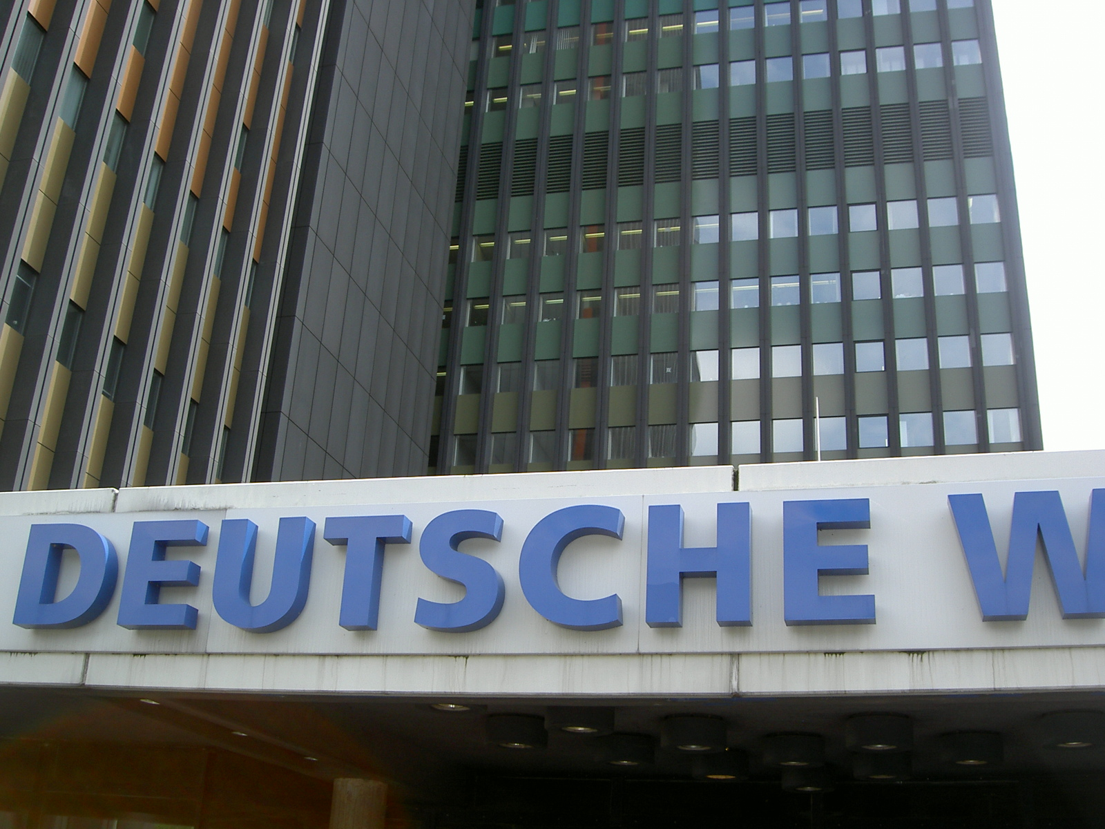 Deutsche Welle in Köln.Eingang zum ehemaligen DW-Hochhaus in Köln-Marienburg.